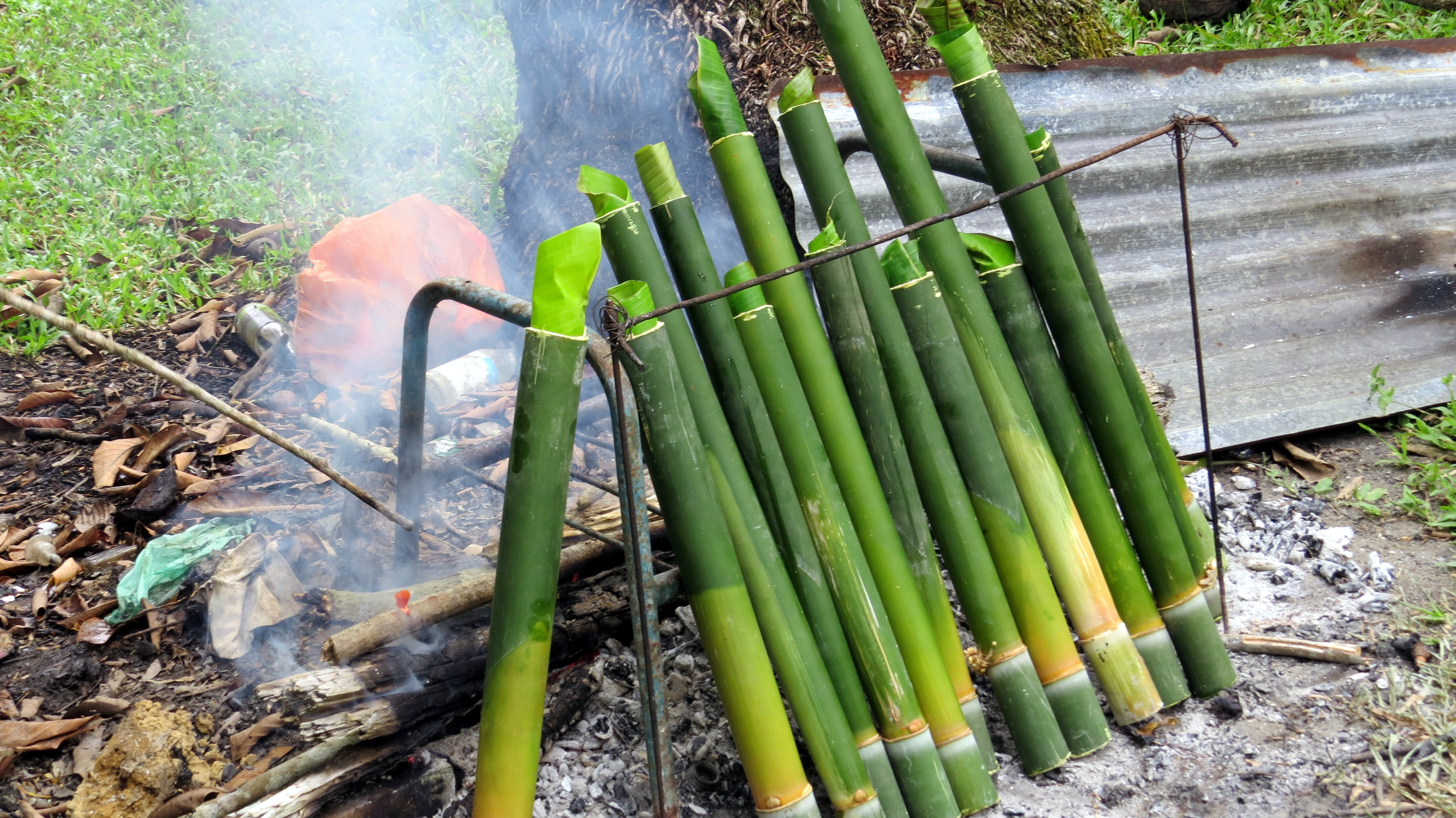 Lemang baru diletakkan di tempat membakar